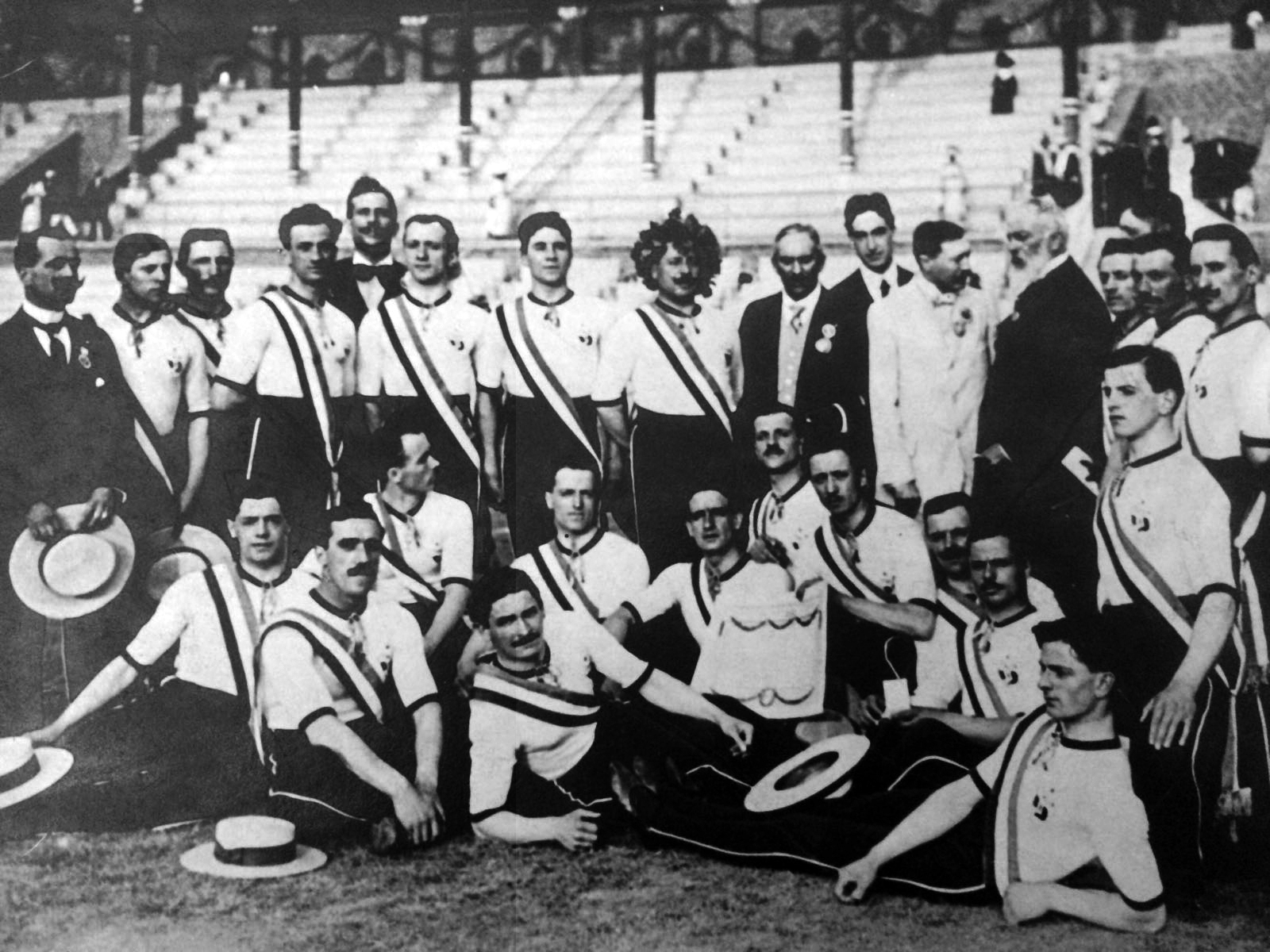 Premiazione della squadra italiana di ginnastica da parte del Comitato Olimpico alla presenza del Re Gustavo V di Svezia (con barba bianca) Giugno 1912